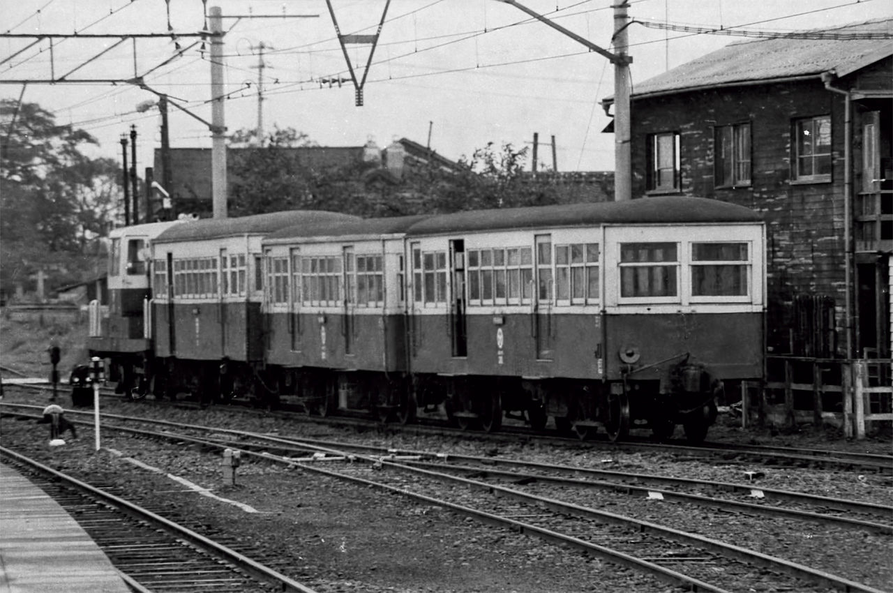 廃線の迫った頃の大分交通耶馬渓線の車輌